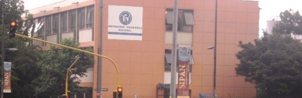 Vista de la Universidad Pedagógica Nacional, sede de la Calle 72 desde la Carrera 11